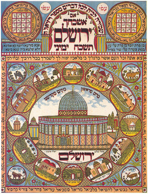 "שמירה לבית" מעשה ידי משה מזרחי , ראשית המאה העשרים. השימוש בדמות ירושלים והמקומות הקדושים נחשב הגנה מספקת מפני עין הרע. כתובות ההשבעה מאפיינות קמעות מזרחיים.(אוסף משפחת גרוס, רמת-אביב)